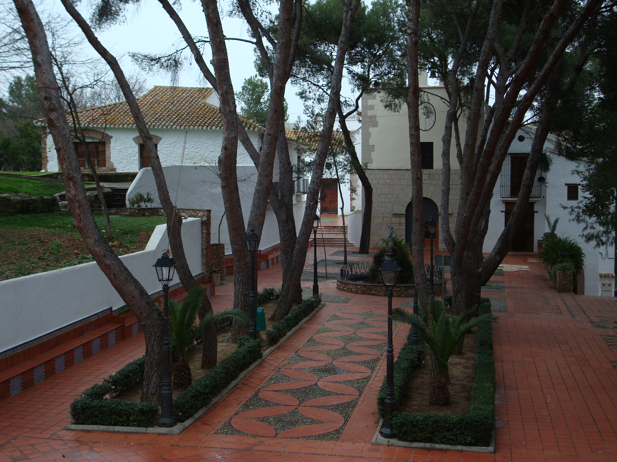 Ermitorio de Nuestra Señora de Gracia, con la ermita propiamente dicha al fondo y la estatua del pastoret y su fuente enfrente.